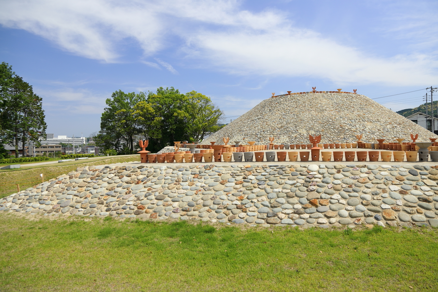 志段味大塚古墳（名古屋市守山区上志段味、2019年（令和元年）5月）